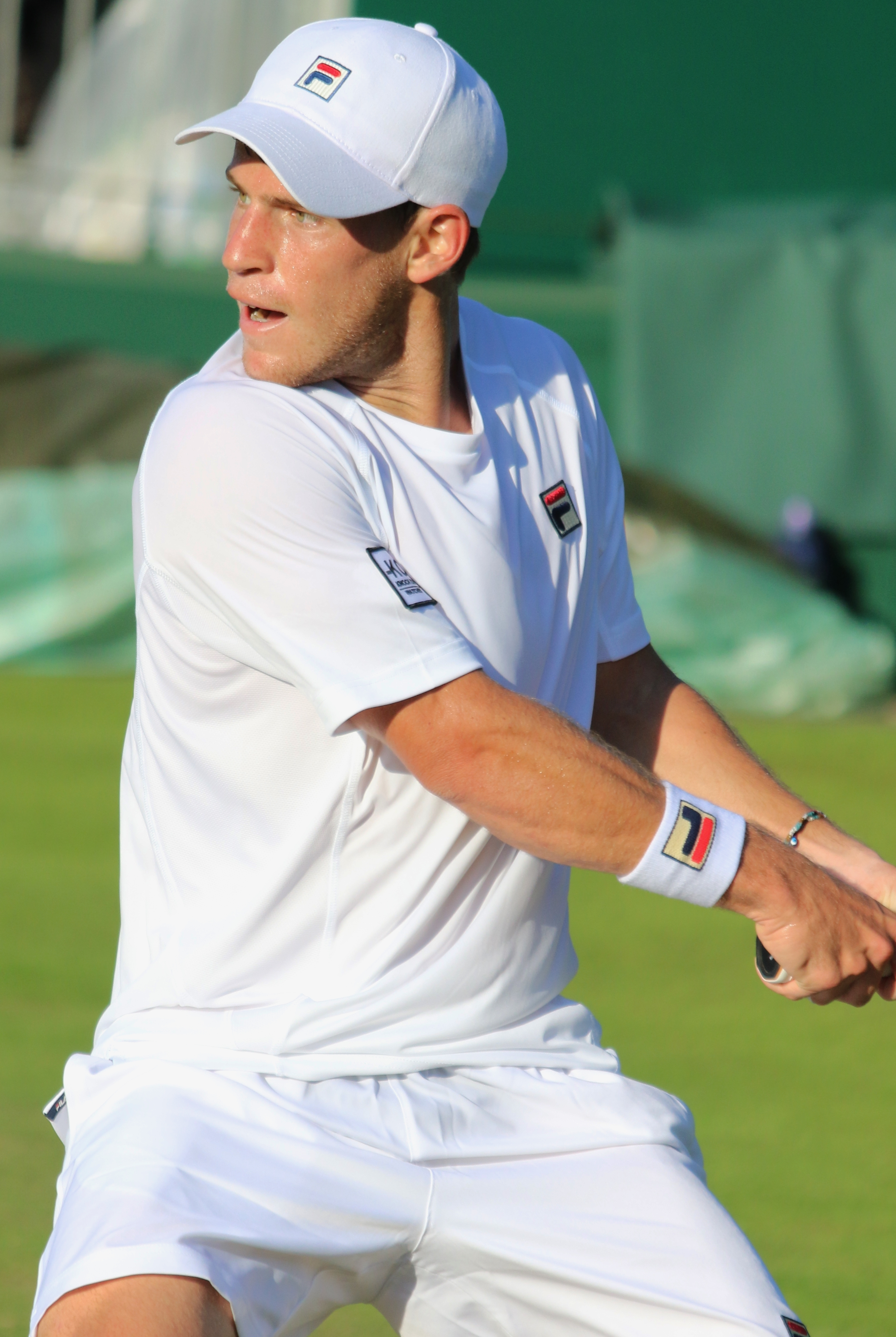 Schwartzman WM17 (16)